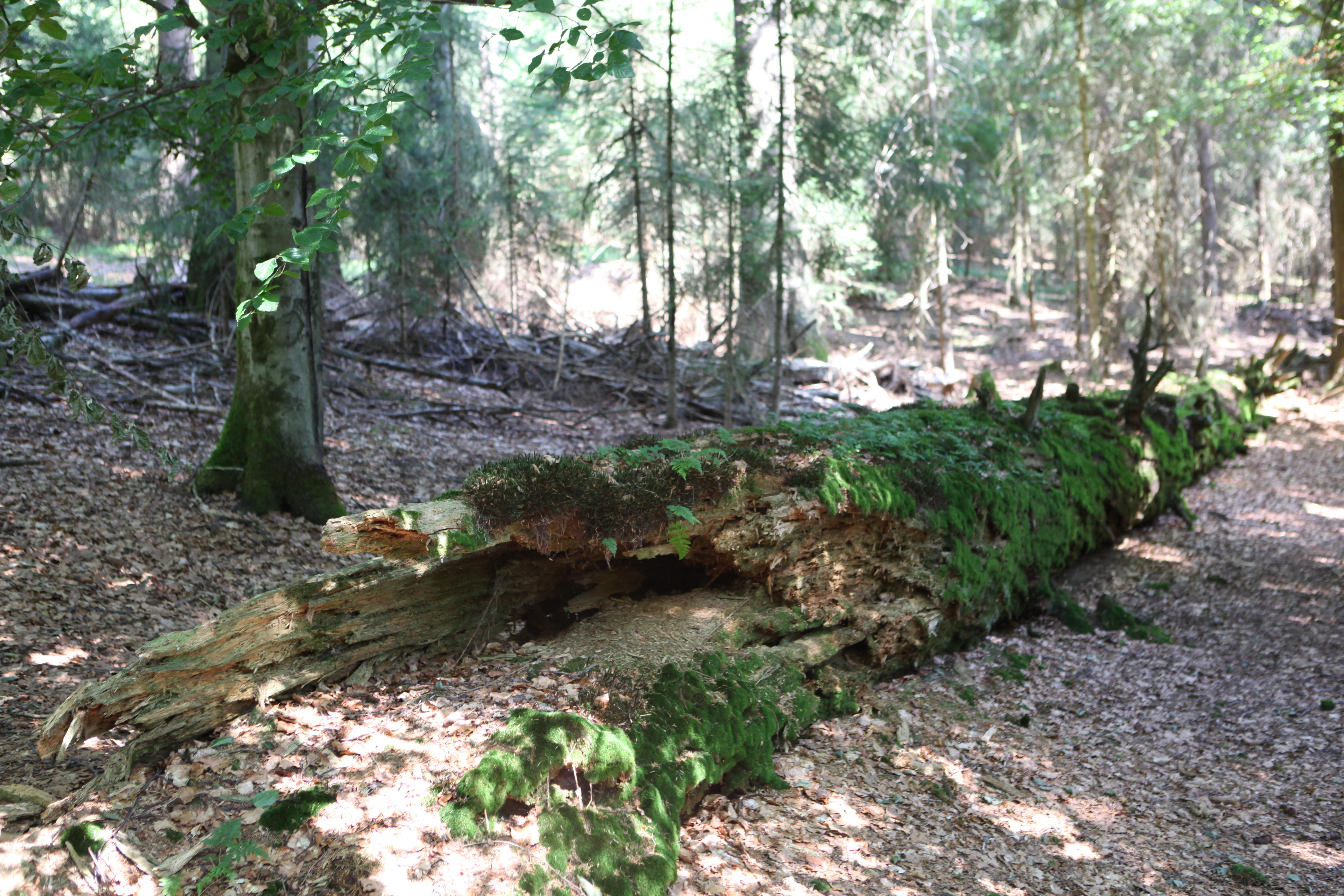 Stumpf der Königstanne, ehemals 44 m hoch und 1947 über 500 Jahre alt eingestürzt